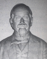 Busto di Achille Sannia (1822-1892), matematico e politico italiano